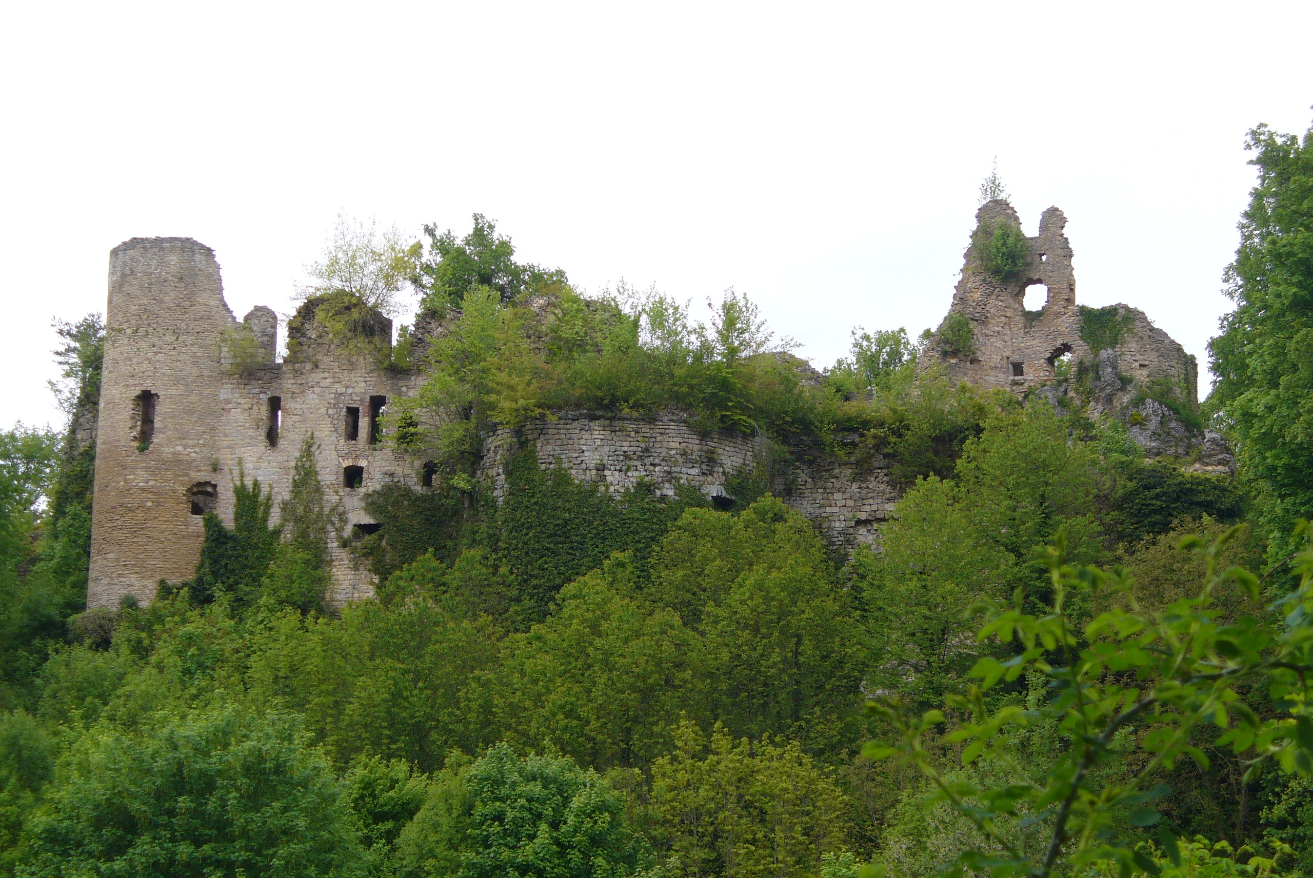 Burgruine Mörsberg/Morimont im Elsass